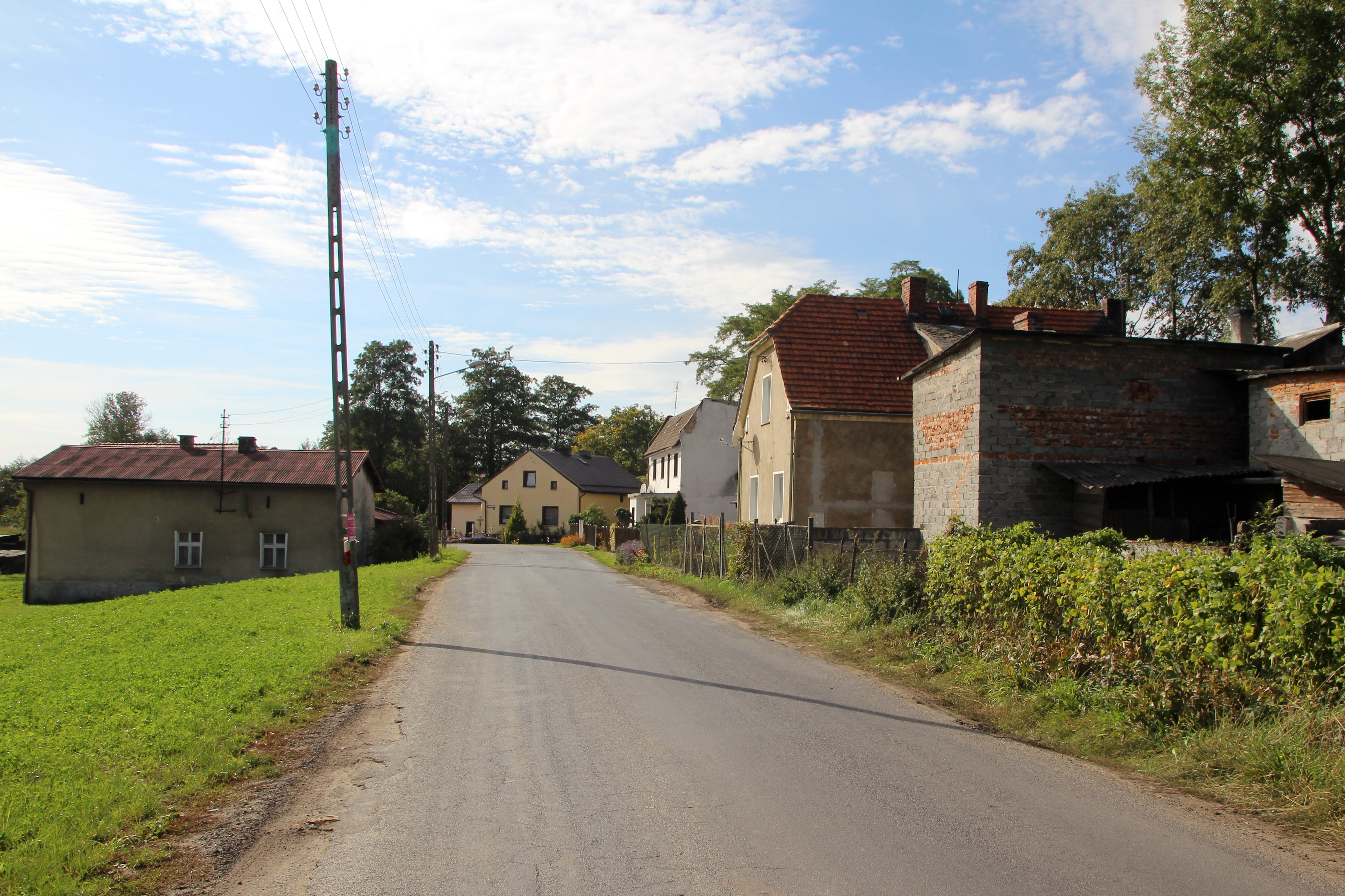 Dzielawy (dodatkowa nazwa w j. niem. Dzielau)- wieś w Polsce położona w województwie opolskim, w powiecie kędzierzyńsko-kozielskim, w gminie Polska Cerekiew.